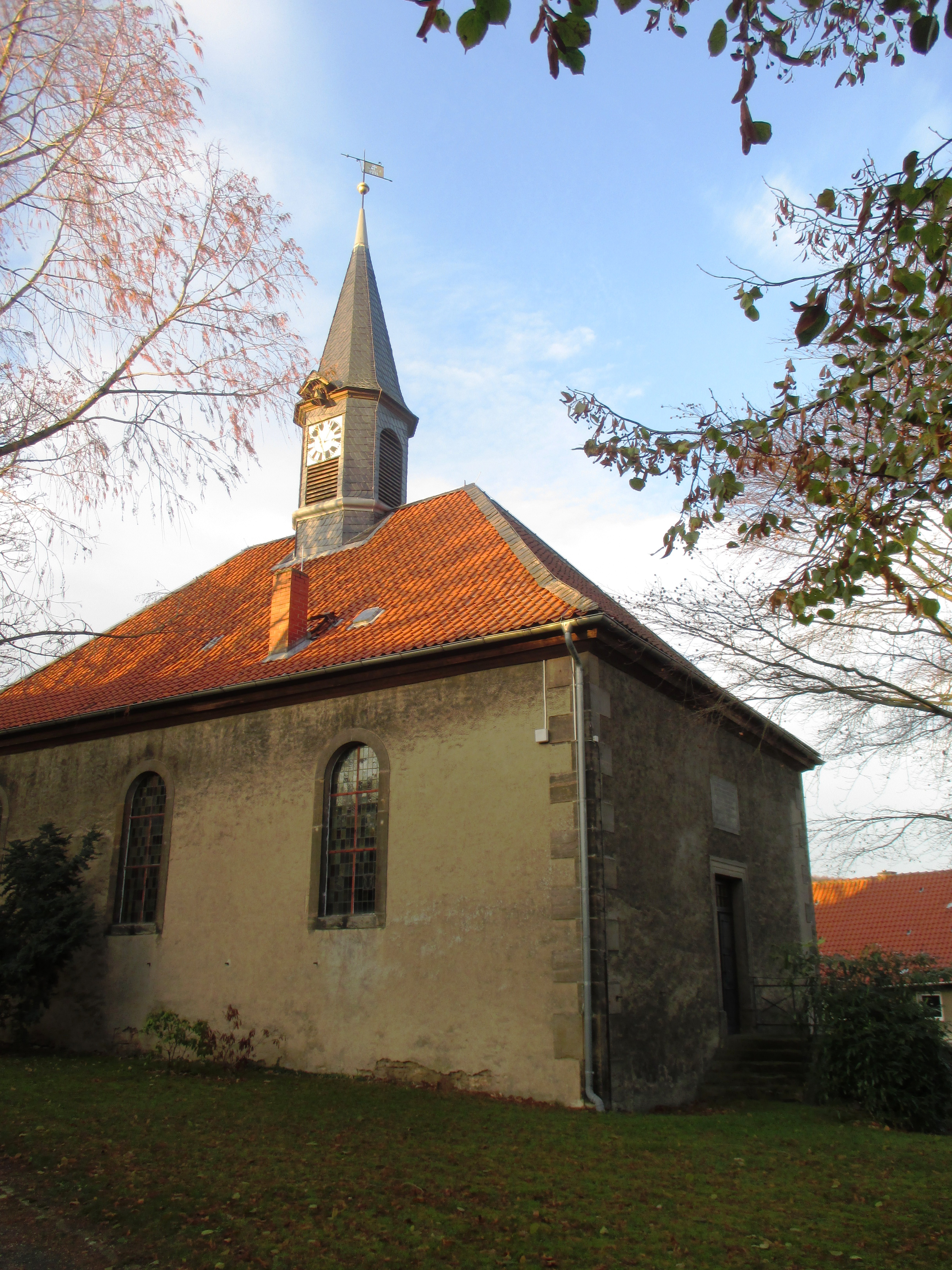 evangelische Kirche in Hahausen, Landkreis Goslar